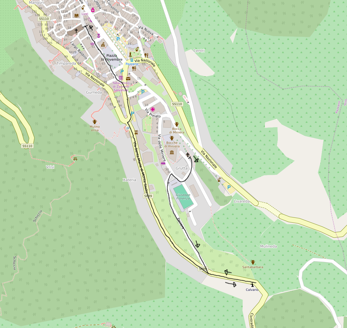 Carta con percorso della domenica mattina Processione del Santo Salvatore Festa del Santo Salvatore a Pazzano Carta creata nel 2016